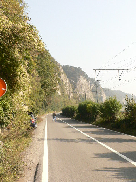 Photos personnelles de Poulsen, auteur de ces photos, les met à disposition complètement libres/